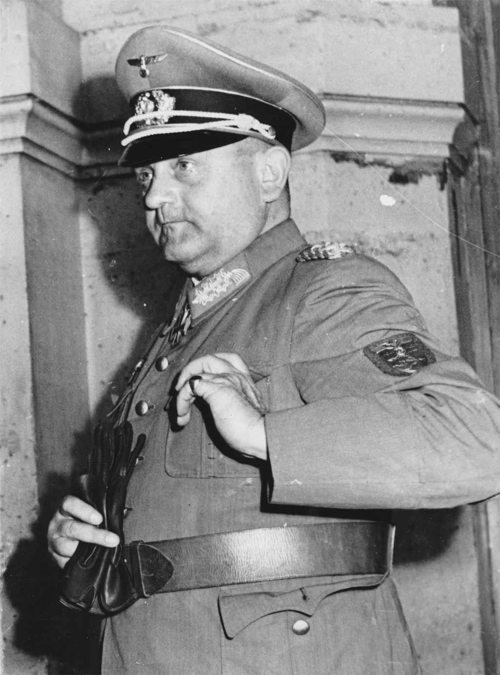 Dietrich v. Choltitz ADN-ZB/Archiv Dietrich von Choltitz, General der faschistischen deutschen Wehrmacht. Er wurde 1944 Wehrmachtsbefehlshaber von Groß-Paris und übergab in dieser Eigenschaft am 24.8.1944 Frankreichs Hauptstadt kampflos den Alliierten. Abgebildete Personen: Choltitz, Dietrich von: General der Infanterie, Ritterkreuz (RK), Heer, Deutschland (GND 118669281)